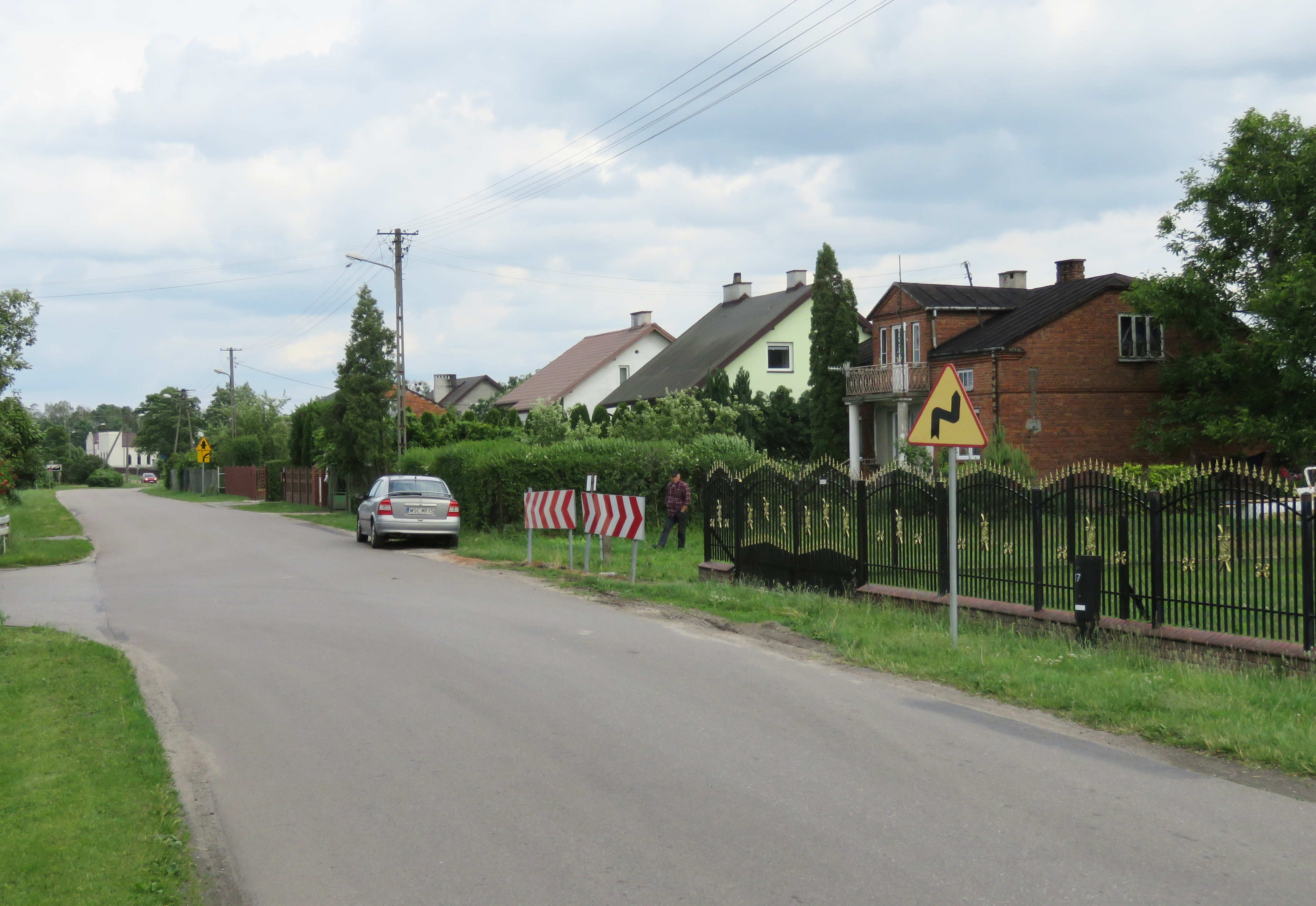 Czyste, gmina Sochaczew